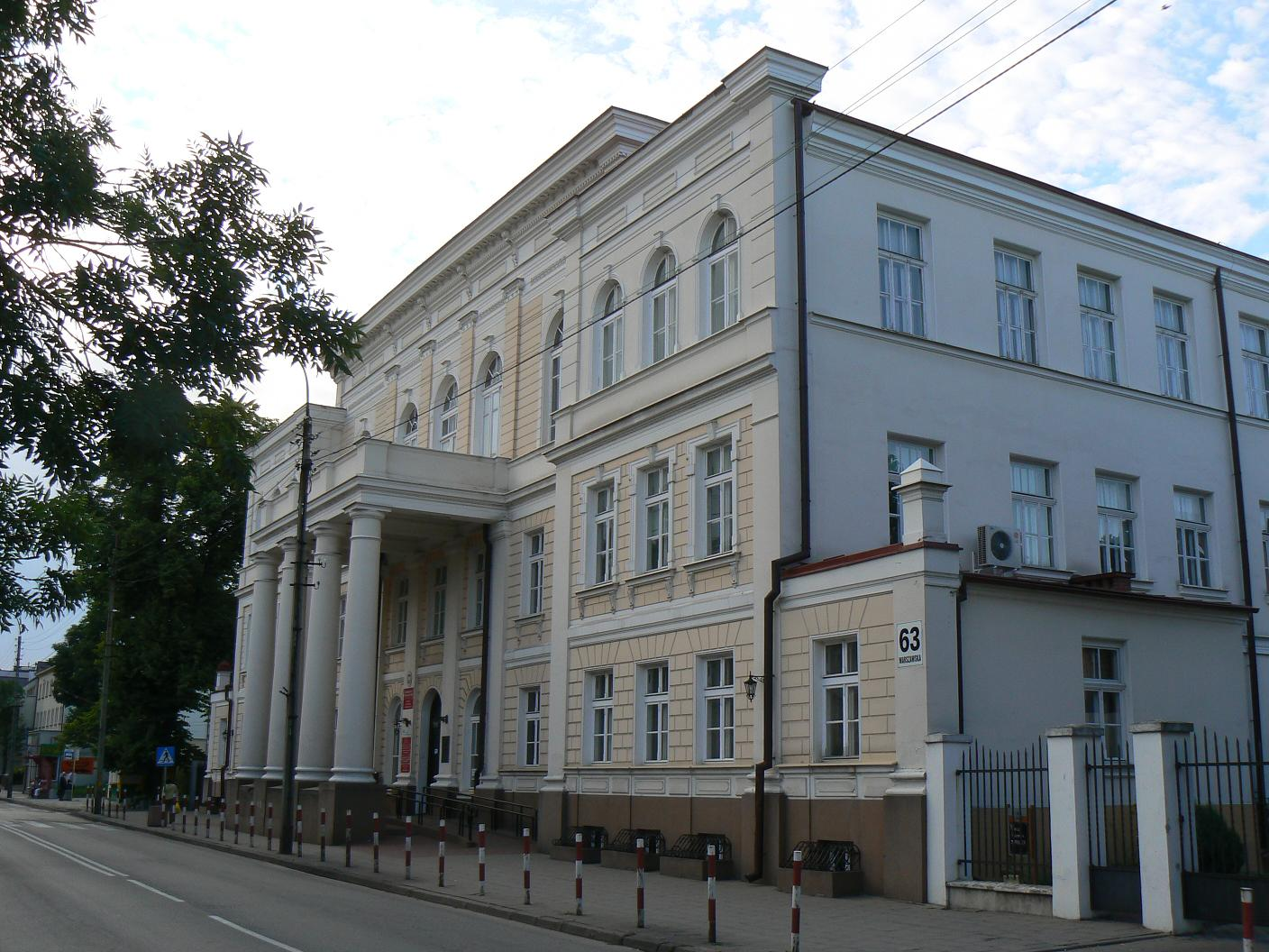 Białystok, ul. Warszawska 63 - dom / "Kamienica pana Trębickiego", obecnie Wydział Ekonomiczny Uniwersytetu w Białymstoku (zabytek nr A-150 z 30.12.1975)